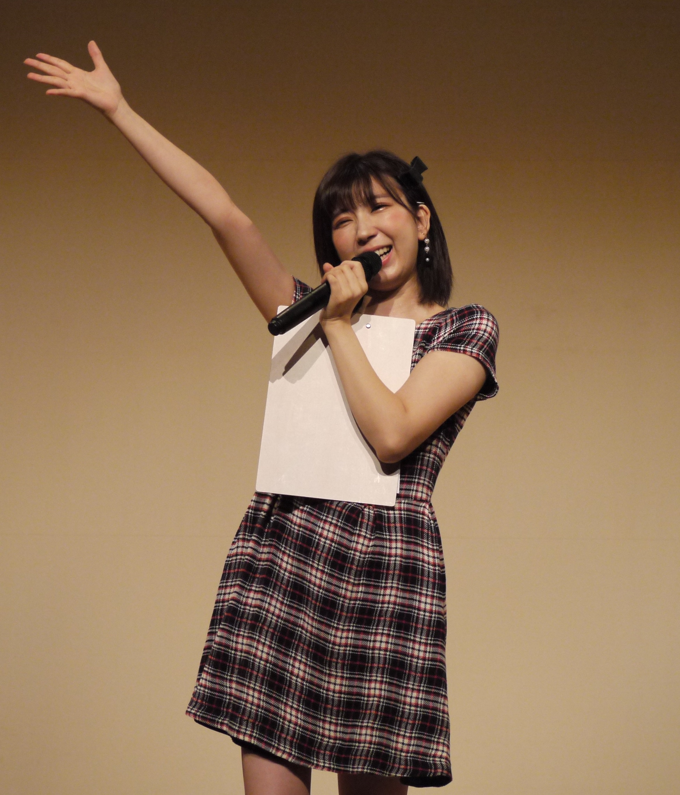 お笑いライブ お子様ランチ ＭＣ